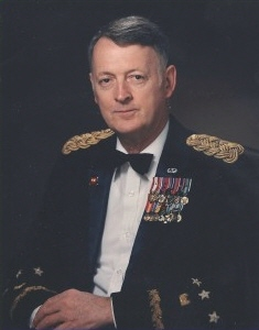 Lieutenant General Elvin R. Heiberg III, Chief of Engineers September 14, 1984–May 5, 1988.